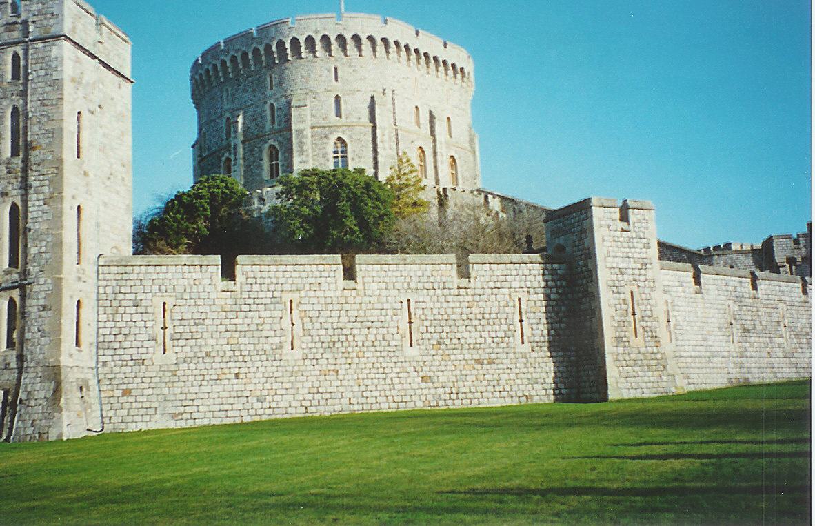 Windsor Schlsass2